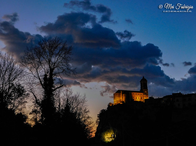 Toffia al tramonto